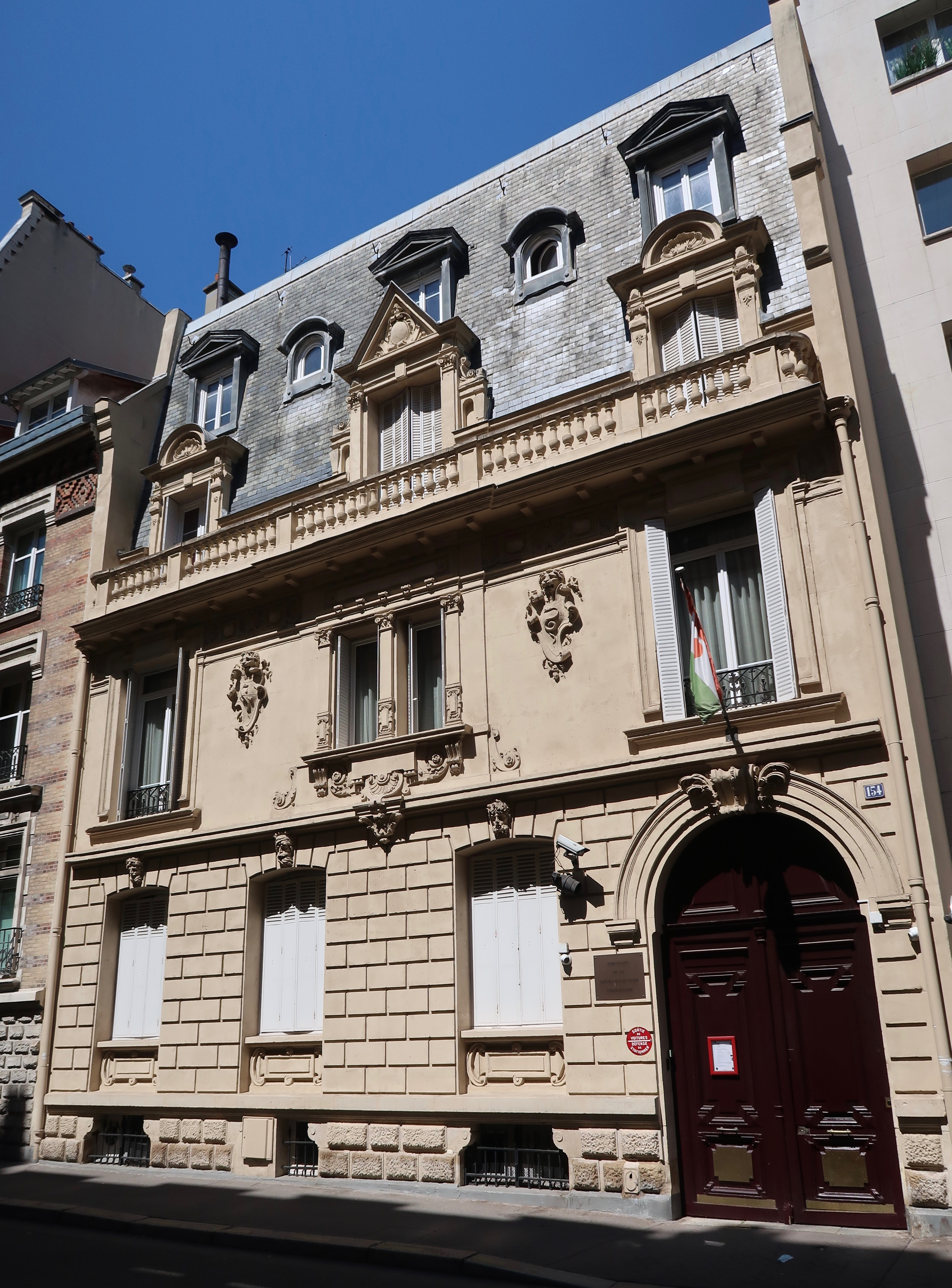 Ambassade du Niger en France, 154 rue de Longchamp (Paris, 16e).